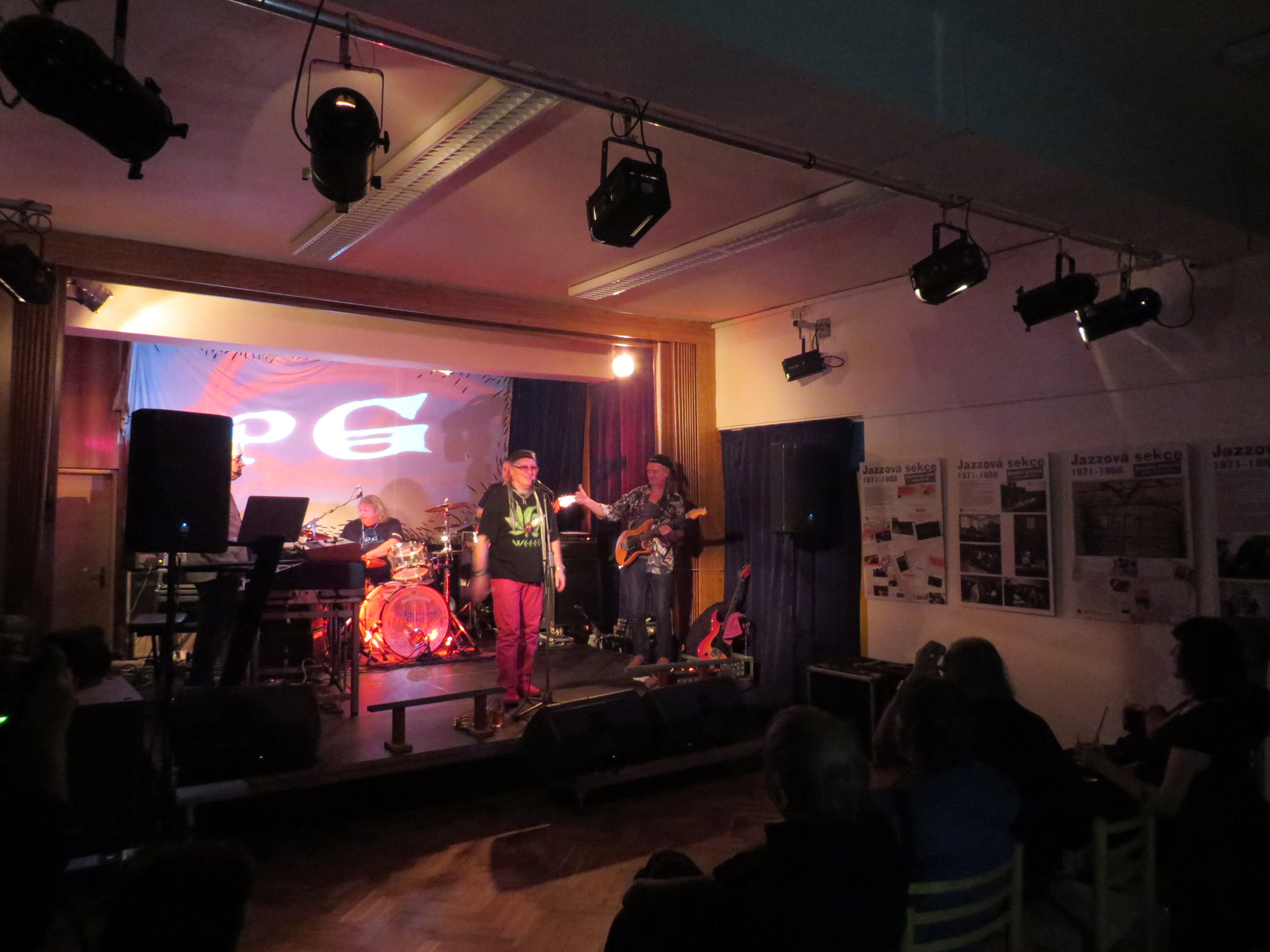 The Primitives Group během vystoupení na vernisáži výstavy o Jazzové sekci. Kulturní dům v Kolíně.